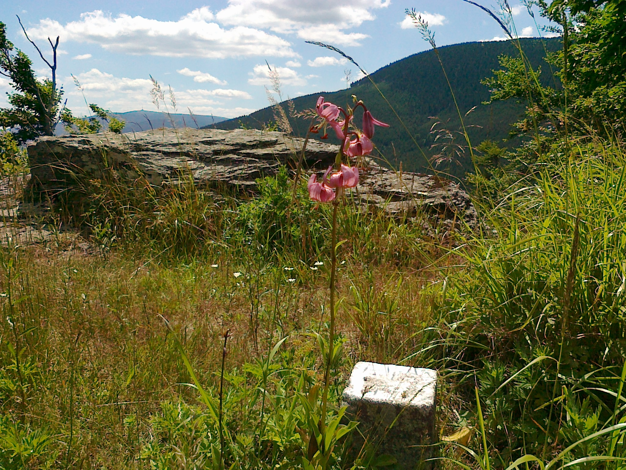 Punkt geodezyjny na szczycie góry Šumný - 1073 m n.p.m., w dali widoczna góra Žalostná